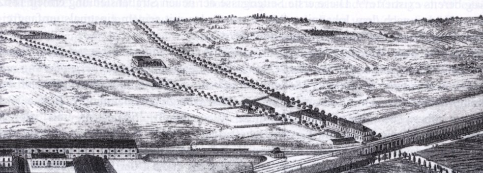 Verbauung vor der Favoritenlinie mit Wien-Gloggnitzer Bahnlinie, Gasthaus Steudel zwischen Himberger und Laxenburger Straße, in der Mitte Roter Hof und ganz links Altes Landgut, um 1843 (Matthias Schönerer, Ansicht (und Situations-Plan) des Hauptstationsplatzes der Wien-Gloggnitzer Eisenbahn nächst dem k.k. Belvedere usw.)